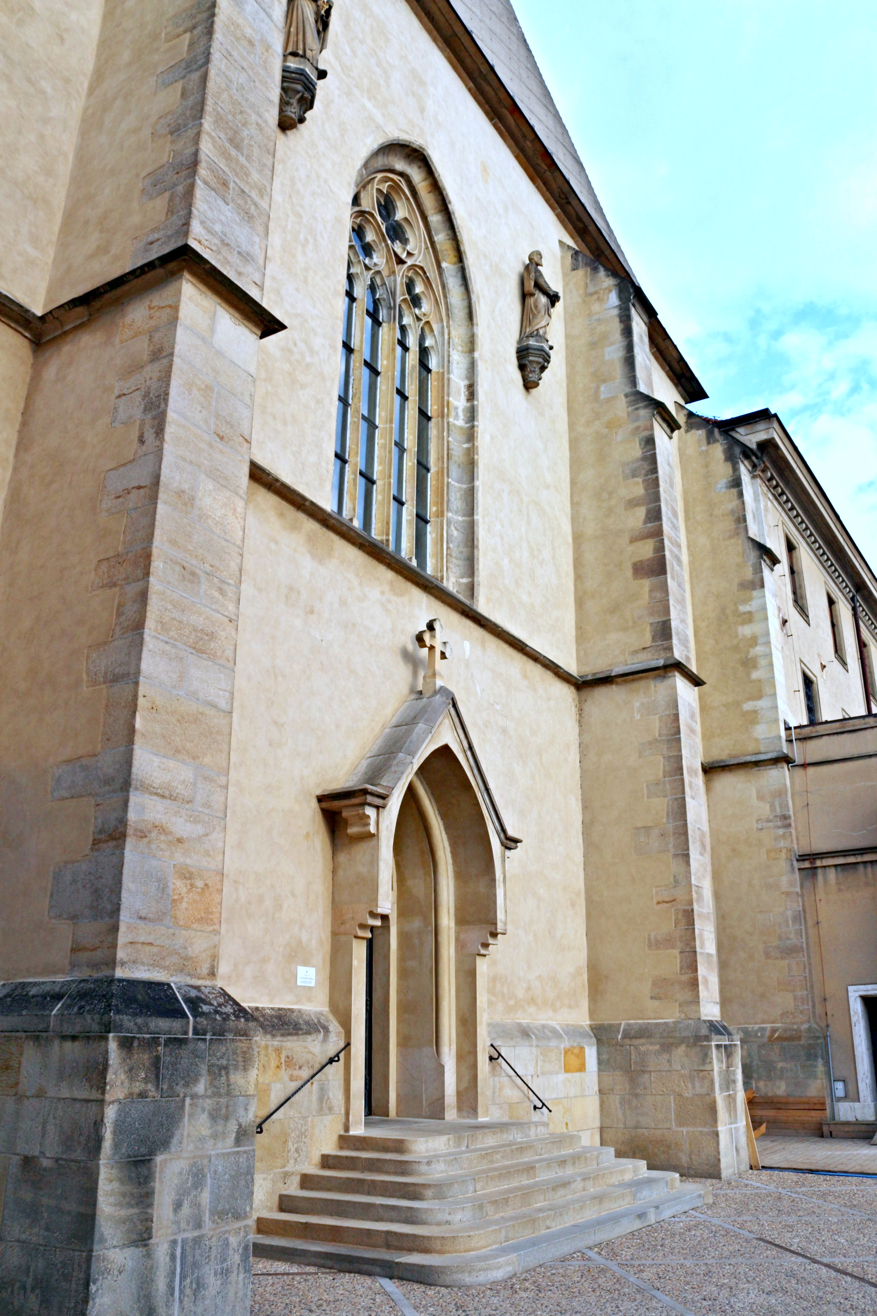 Kostel Panny Marie na Slovanech